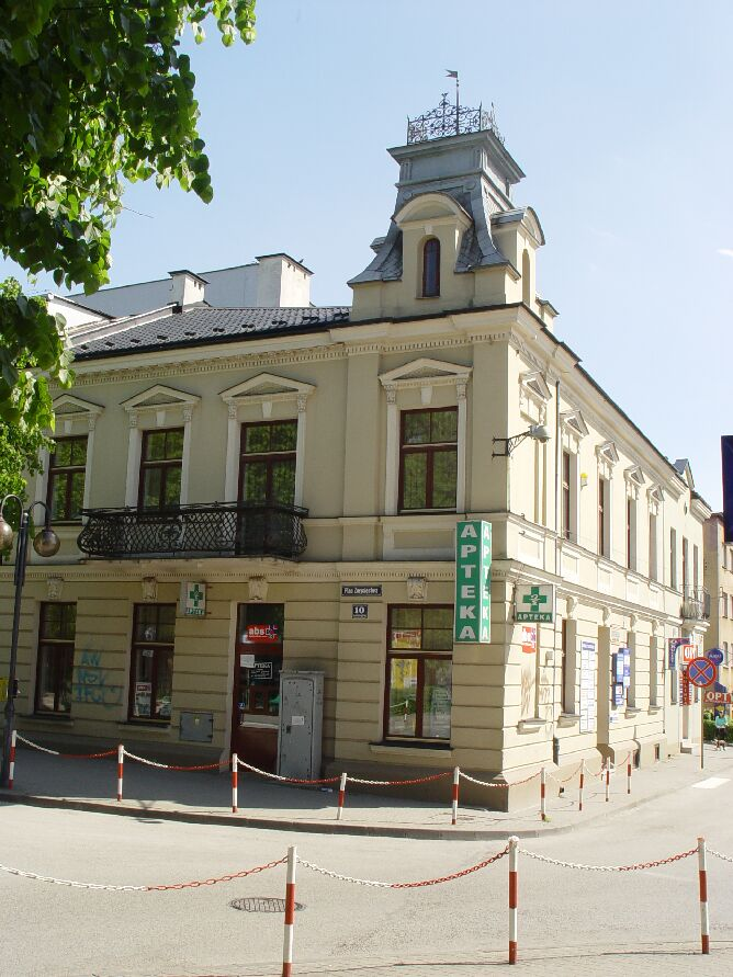 Busko-Zdrój, Rynek, Stara Poczta, elewacja północna i wschodnia 08.1975.